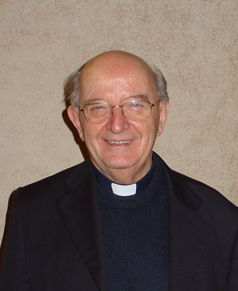 Ugo Vanni, biblista italiano